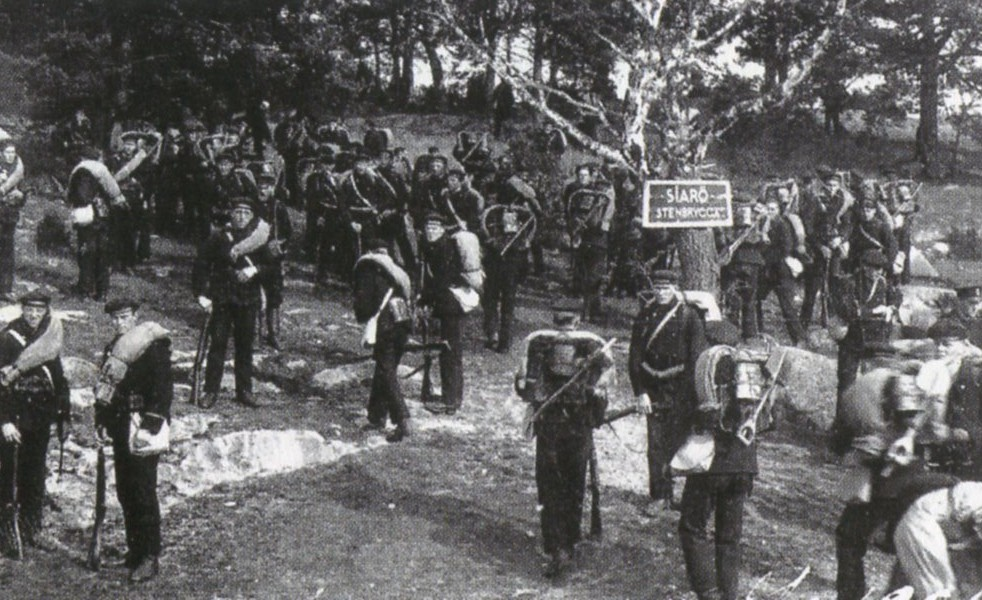 Kustartilleriet på Siarö 1925